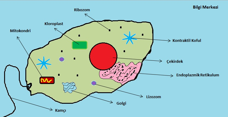 Türkmençe: Öglenanın yapısı